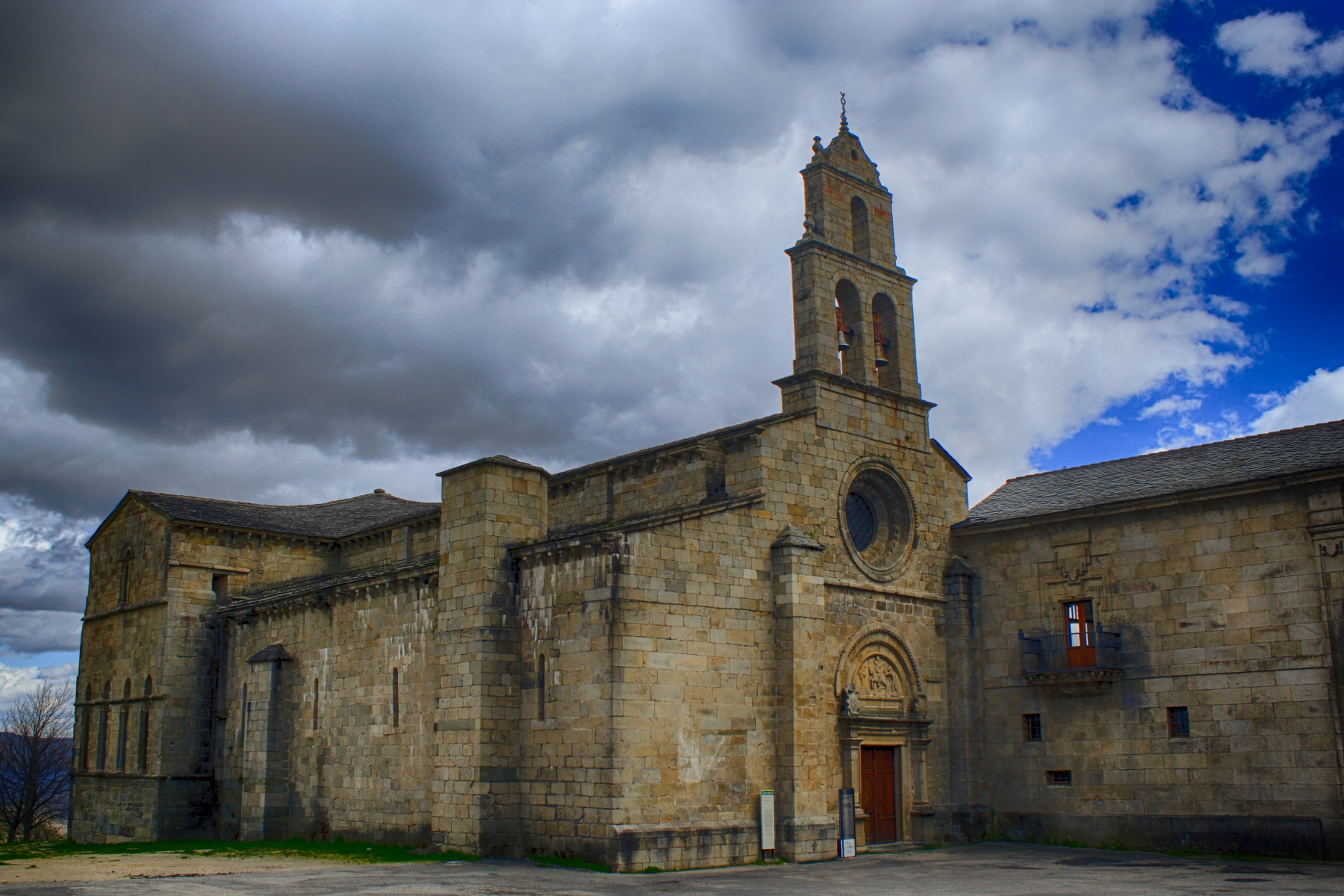 Monasterio de San Martín de Castañeda, de origen visigodo fue destruido por los musulmanes. Se restauró a finales del siglo IX o principios del X. Fue declarado Monumento Histórico Artístico Nacional el 3 de junio de 1931. San Martín de Castañeda, municipio de Galende Provincia de Zamora Castilla y León España